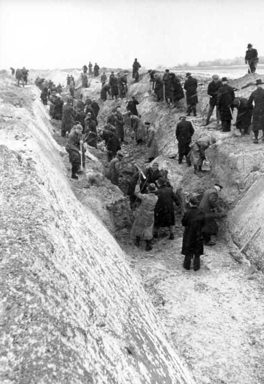 Berlin, Bau von Panzergrtäben am Stadtrand ADN-ZB/Archiv Das faschistische Deutschland im II. Weltkrieg 1939-45 Berlin wird am 1. Februar 1945 zum "Verteidigungsbereich" erklärt. Volkssturmsoldaten heben im Schneetreiben am Stadtrand Panzergräben aus. Aufnahme Februar/März 1945 343-45